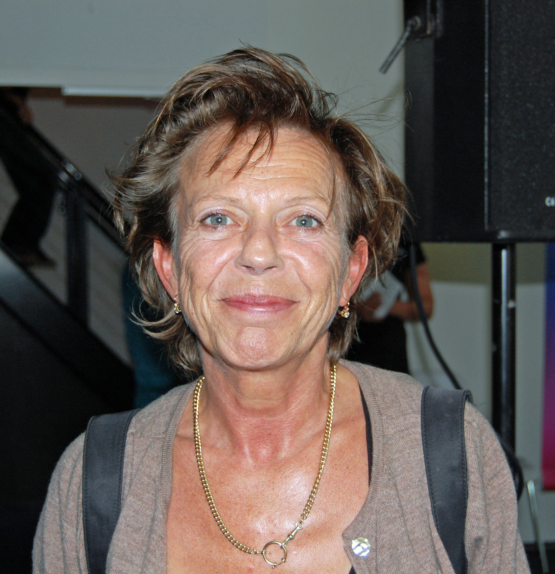 Connie Palmen op Manuscripta, voor de promotie van 'Logboek van een onbarmhartig jaar' (Prometheus, 2011)